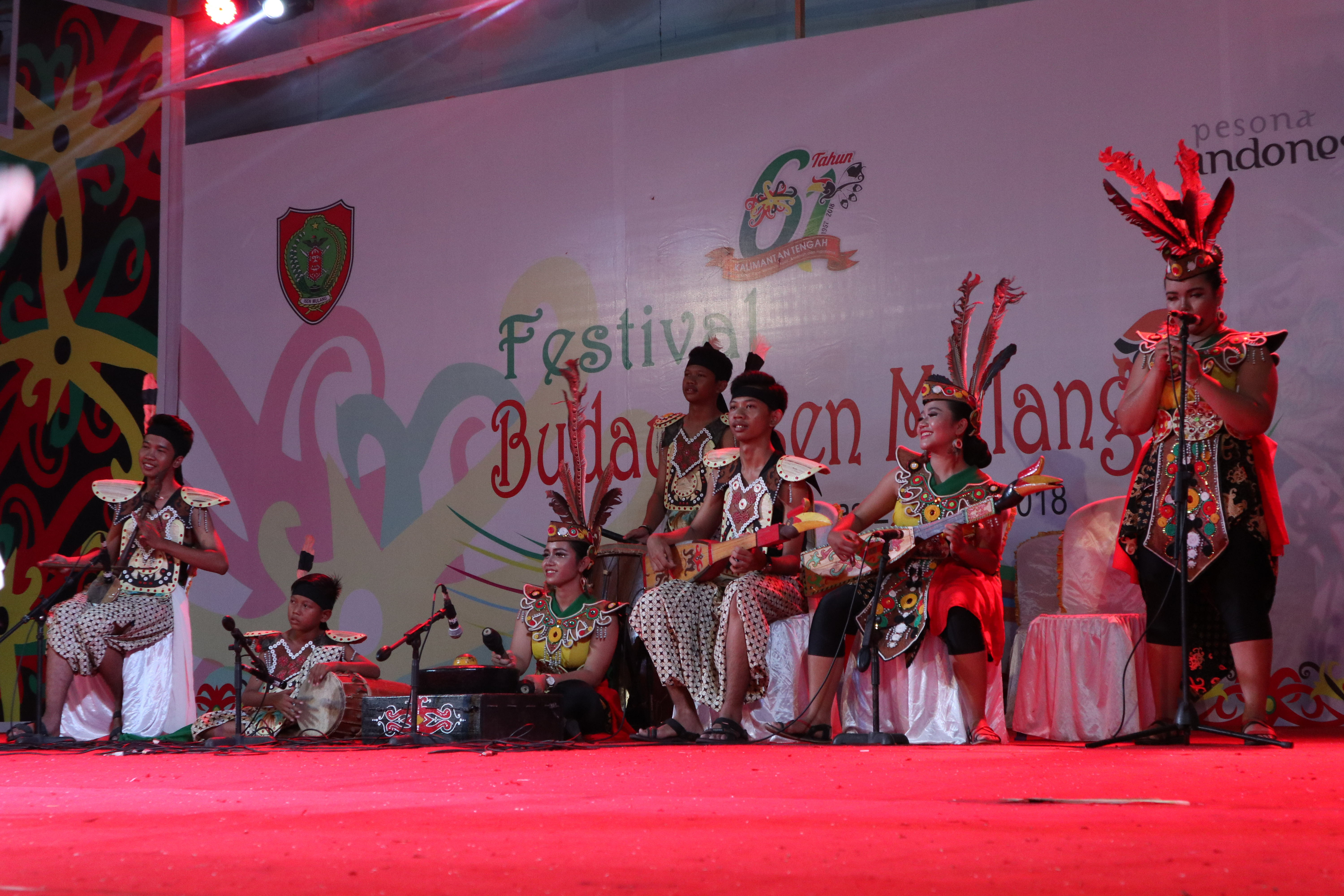 Salah satu penampilan grup musik Karungut Kalimantan Tengah dalam Festival Budaya Isen Mulang 2018.